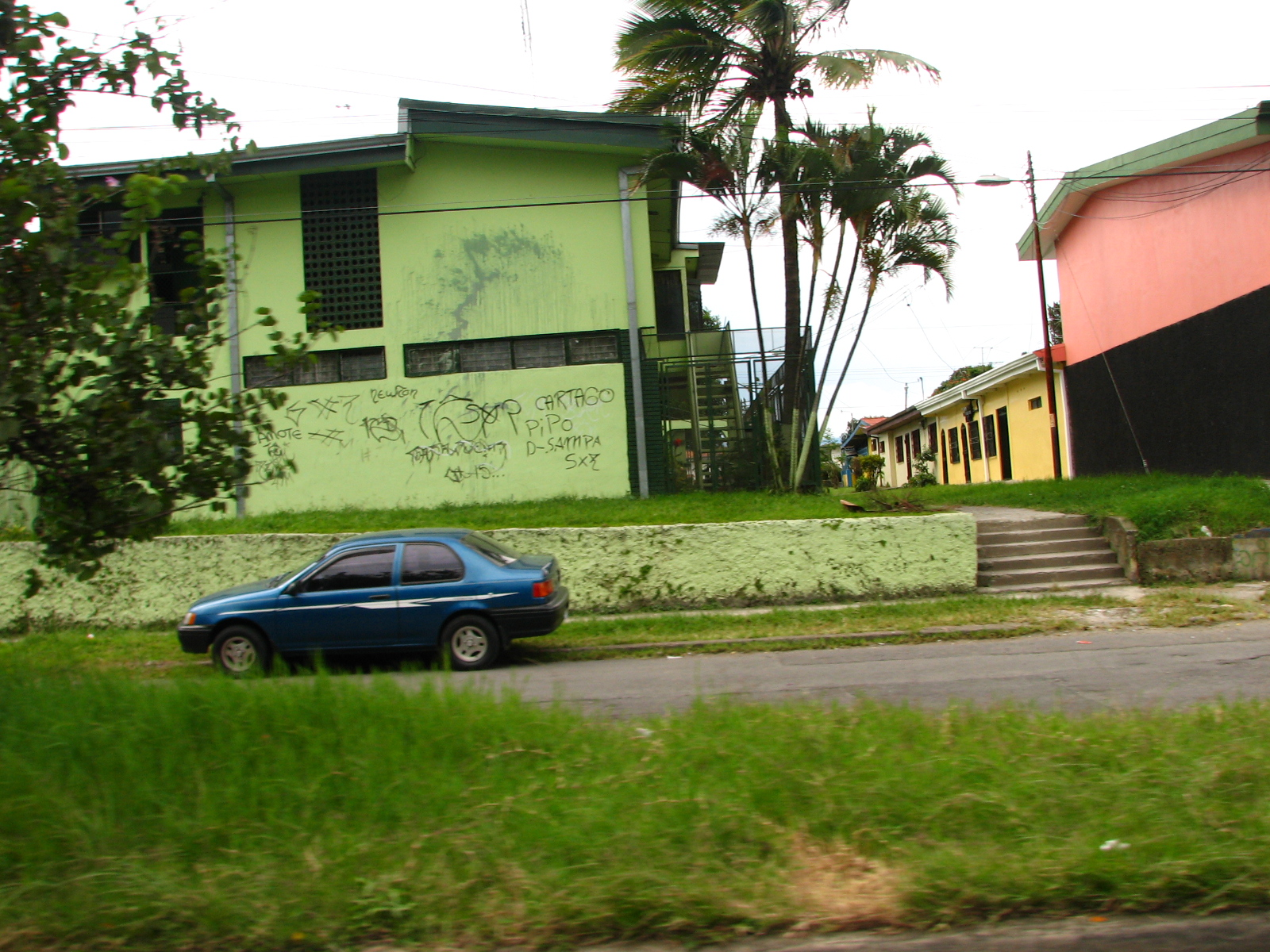 San Sebastián, Costa Rica